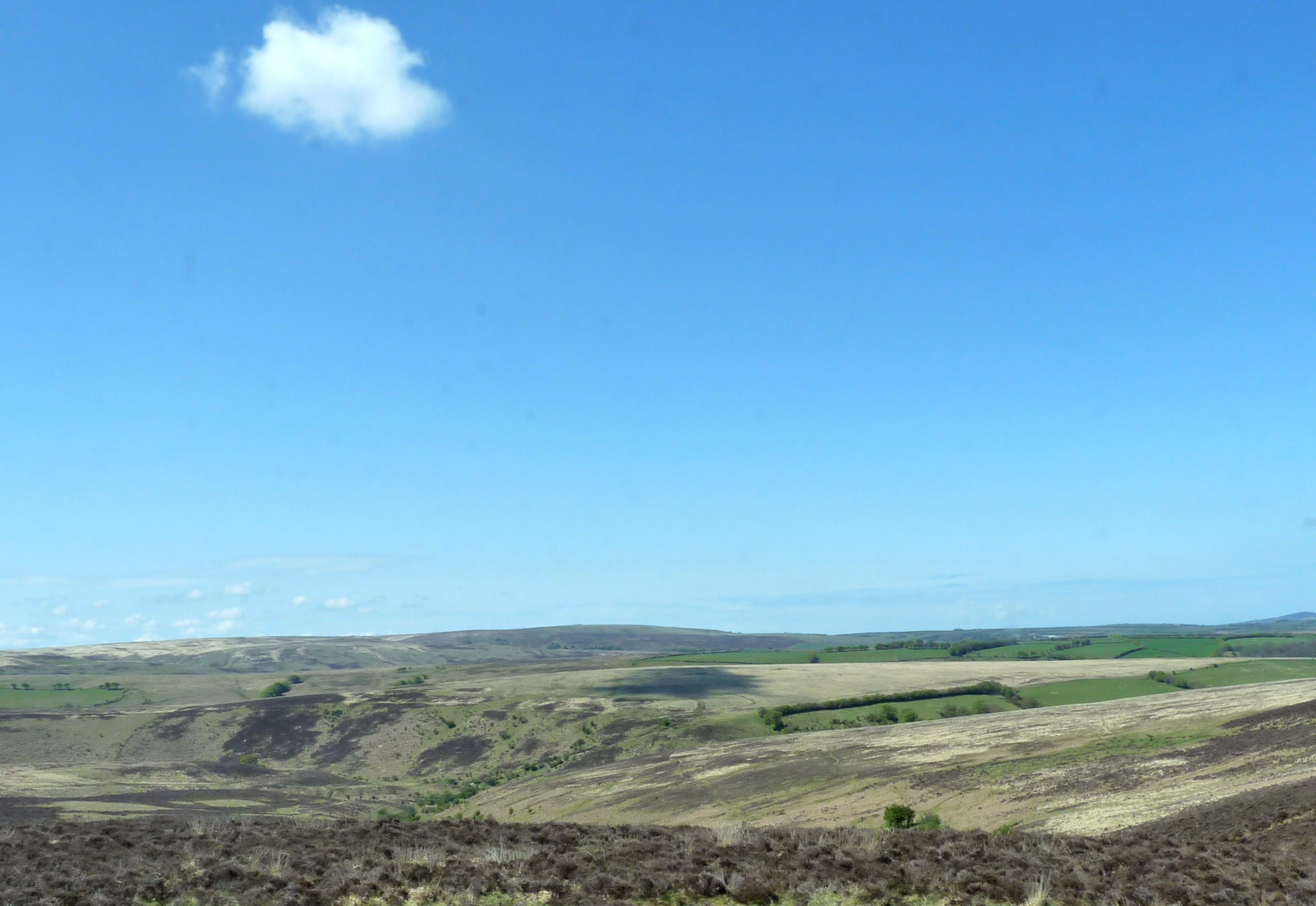 Exmoor 08